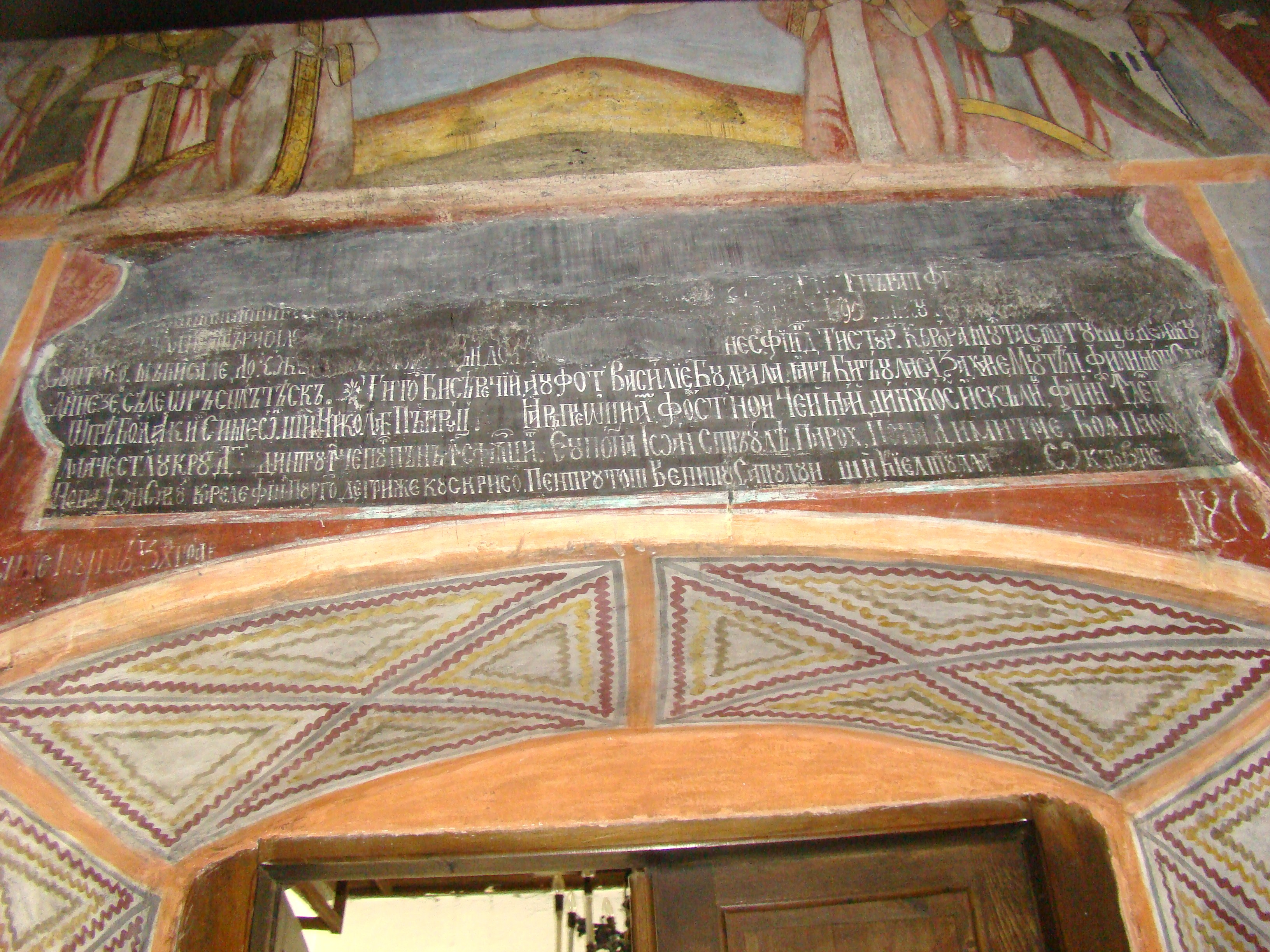 Biserica „Buna Vestire" din Jina, județul Sibiu